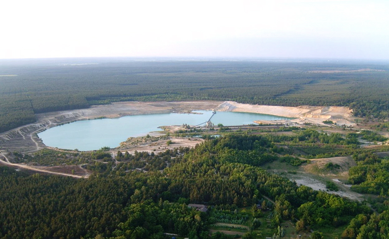 Die Kiesgrube von Haida (Röderland) aus der Luft.